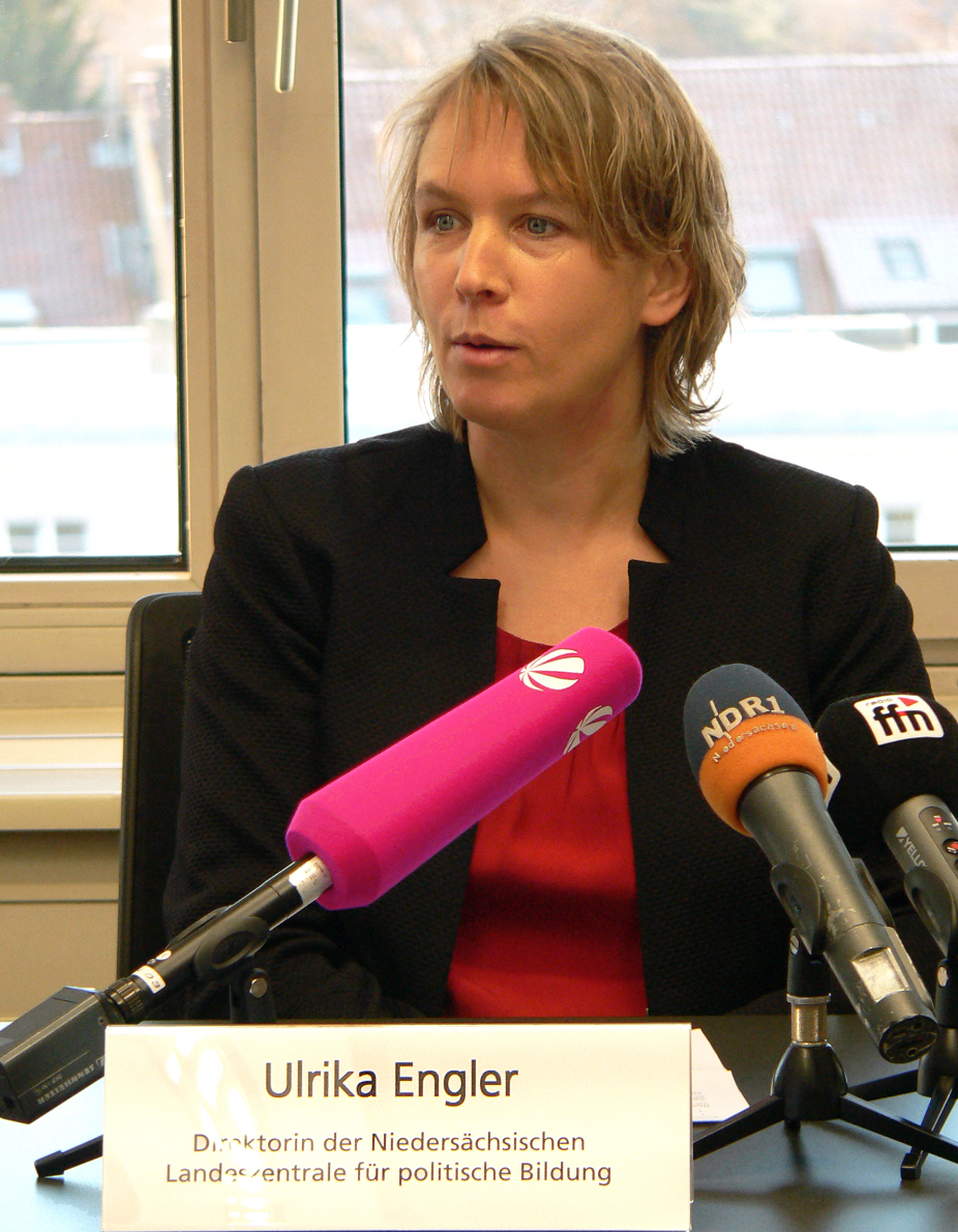 Die designierte Leiterin der Niedersächsischen Landeszentrale für politische Bildung Ulrika Engler bei einer Pressekonferenz zur Wiedereinführung der Landeszentrale